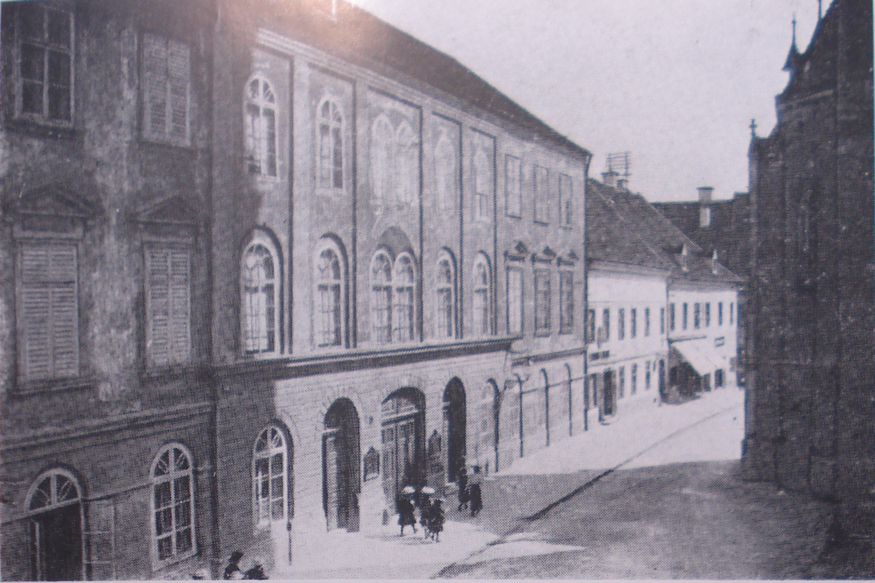 Sabornica na Trgu sv. Marka prije pregradnje 1907.